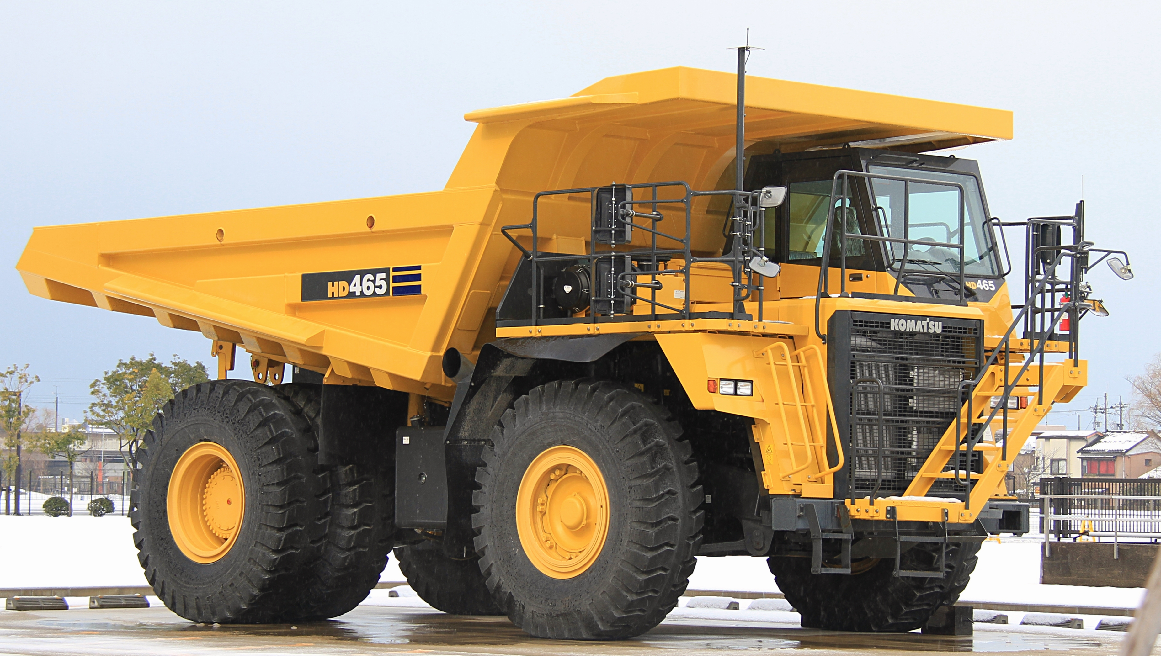 Komatsu HD465